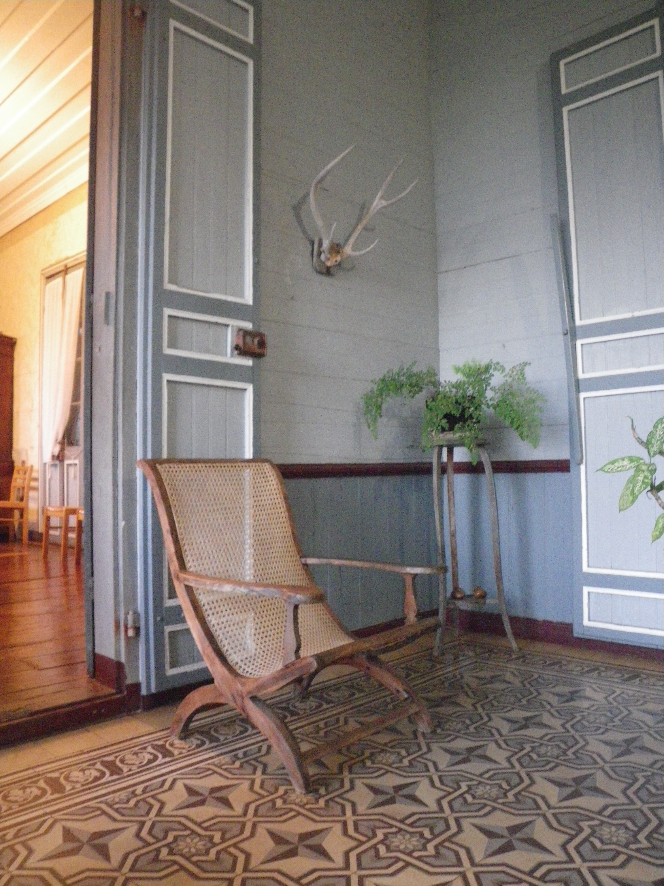 Détail sur le côté gauche de l'entrée du Domaine du Grand Hazier .